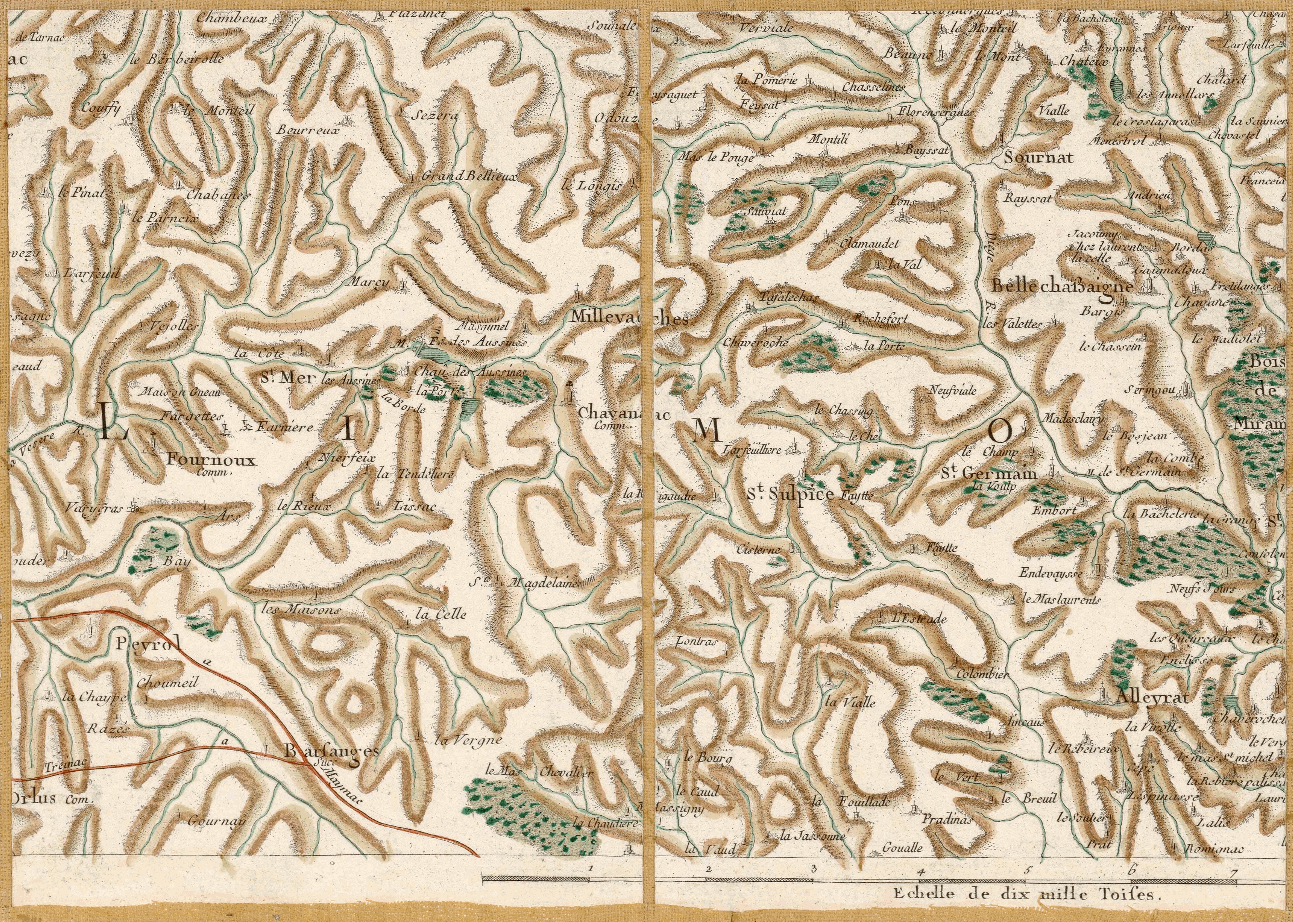 Communes de Meymac, Saint-Merd-les-Oussines, Millevaches Chavanac Peyrol-sur-Vézère.